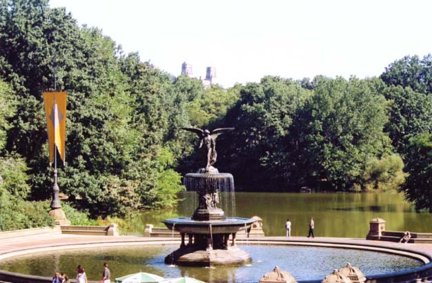 Fountain